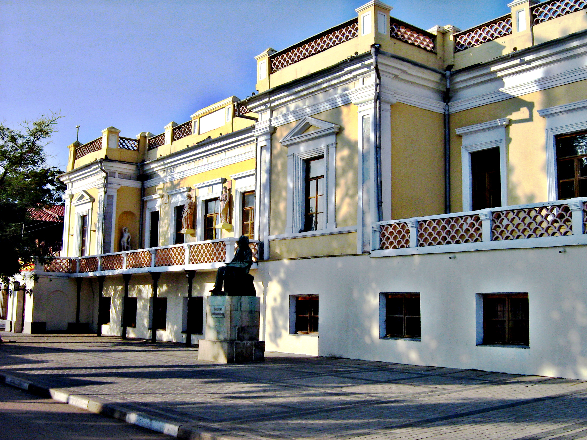 Картинная галерея Ивана Айвазовского в Феодосии. Крым. Украина.